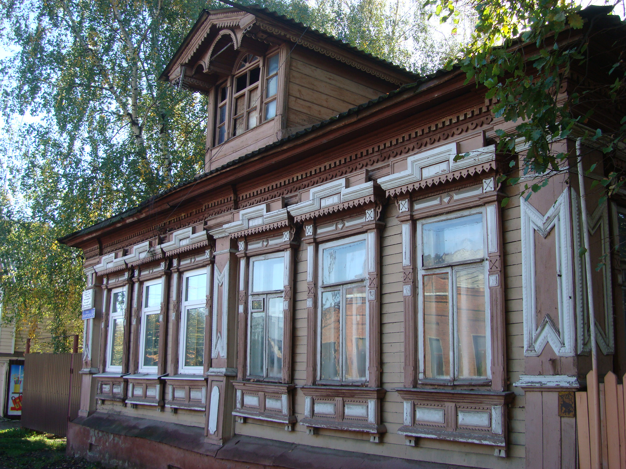 фотоснимок дома поэта Олега Чухонцева в Павловском Посаде